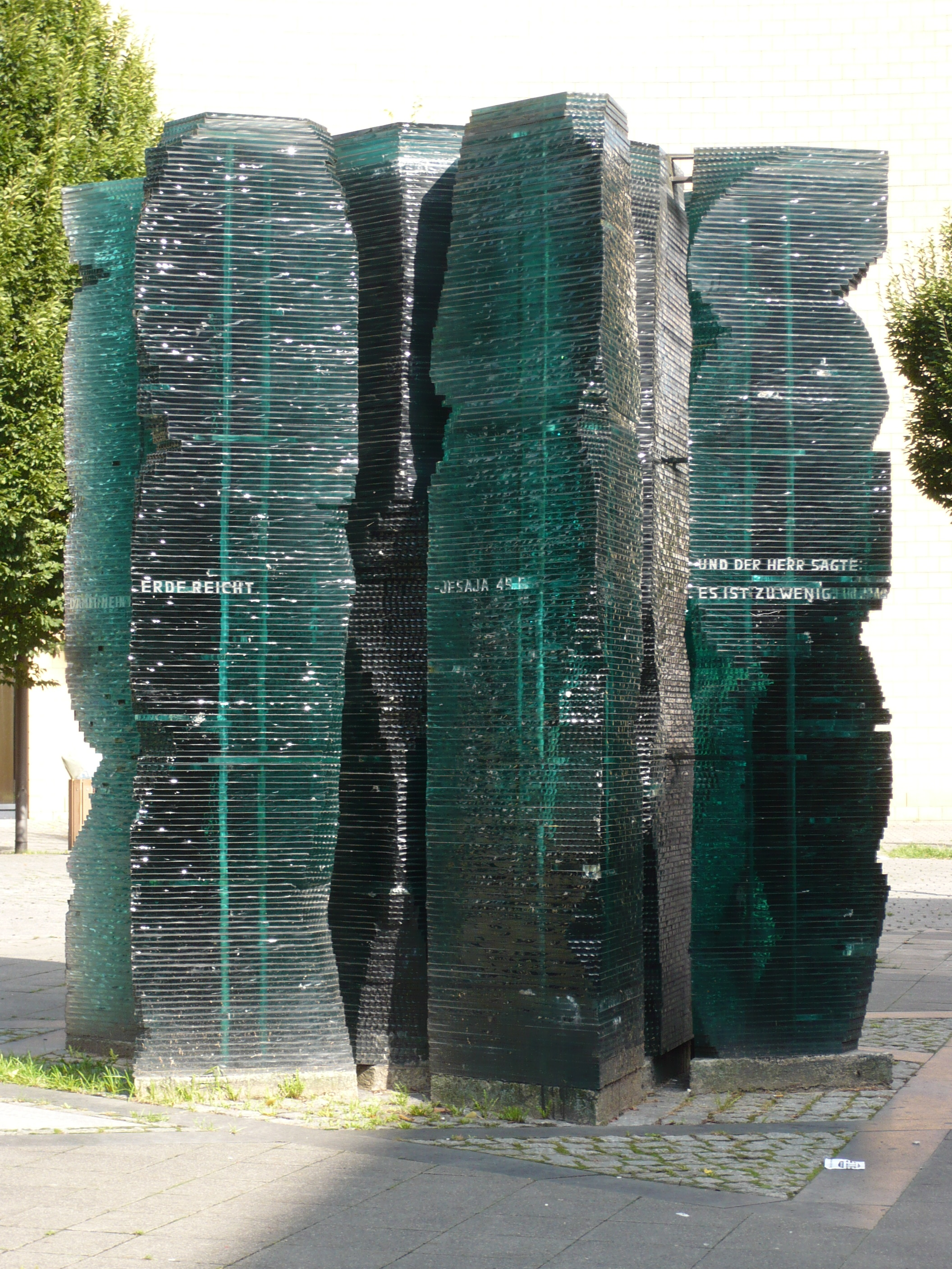 Das in Erinnerung an die Pogrome vom 8./9. November 1938 "Kristallnacht" genannte Mahnmal von Heinz Tobolla wurde am 8. November 1984 auf dem Synagogenplatz in Aachen enthüllt. Es steht vor der 1995 wieder erbauten heutigen Synagoge. Das Mahnmal trägt die Inschift: "Und der Herr sagte, es ist zu wenig, daß du Israel mein Knecht bist, nur um die Stämme Jakobs wieder aufzurichten. Ich mache dich zum Licht für die Völker, damit mein Heil bis an das Ende der Erde reicht. Jesaja 49,6" Ein Gedenkstein am Fuß des Mahnmal trägt die Inschrift: "Dieses Denkmal errichteten die Evangelische und die Katholische Kirche der Stadt Aachen zur Mahnung gegen jeglichen Haß und jede Feindschaft. 8. November 1984" Eine Stahltafel hinter dem Mahnmal ist beschriftet: "Das Denkmal stellt dar: Die Geschichte Israels als Stern aus David. Trotz vieler Schläge ragt er in seinem Wesen unzerstörbar in die Zukunft. - Die Bürger Aachens erinnern sich an diesem Platz an die Synagoge, die am 19. September 1862 ihrer heiligen Bestimmung übergeben wurde, von den Nazis am 8. November 1938 geschändet und zerstört."